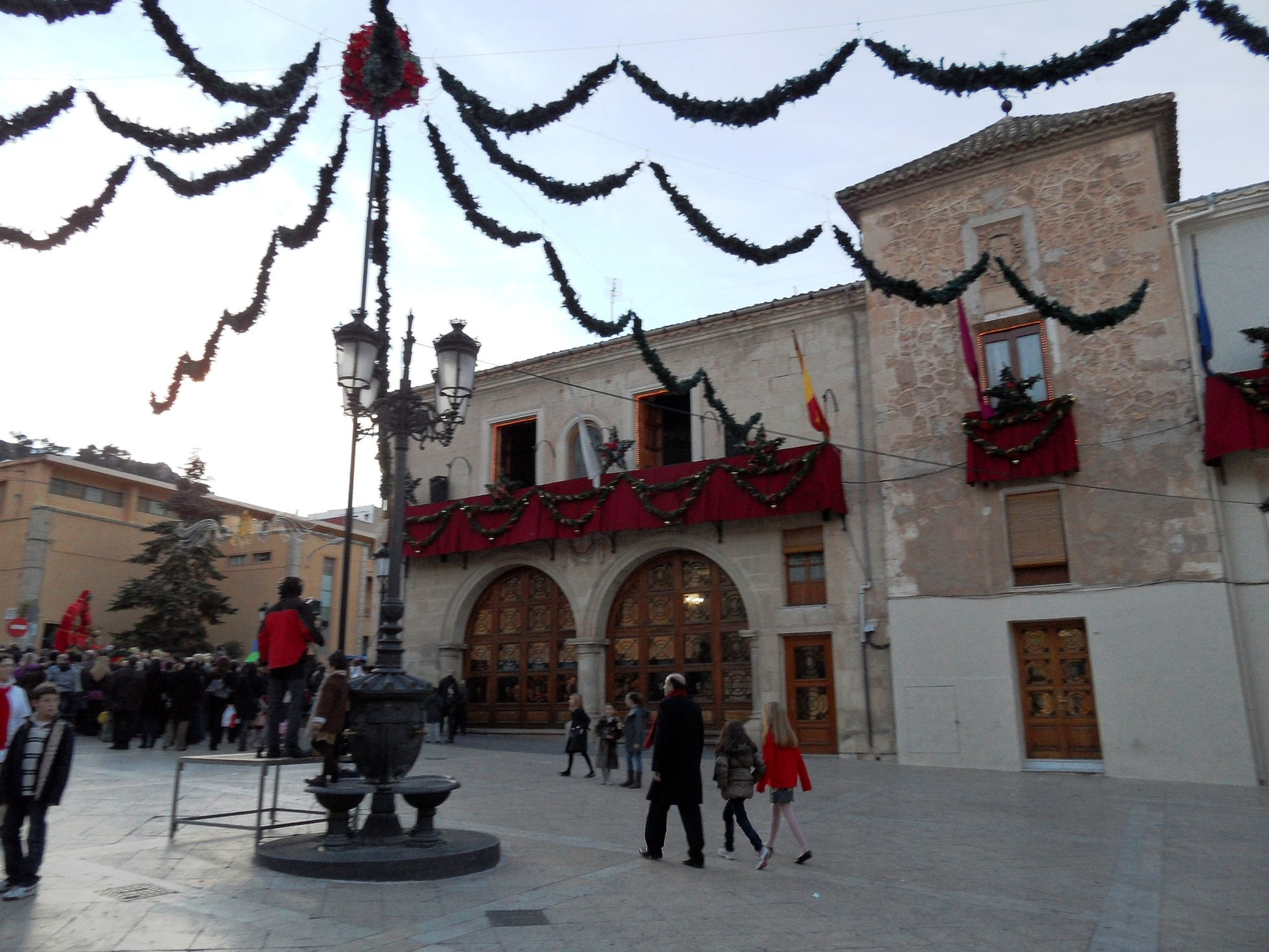 Ayuntamiento; antiguo concejo y su torre.